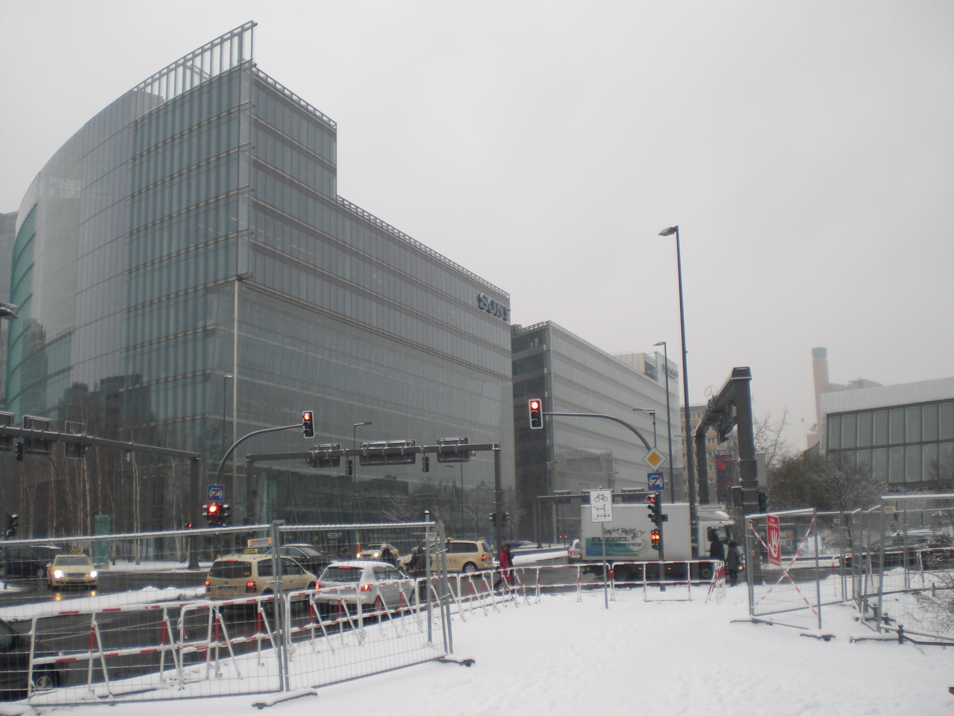 Kemperplatz in Berlin, links Sony-Center, rechts Musikinstrumente-Museum, hinten Turm zur Entlüftung des Tiergartentunnels B96; Blick nach Süden